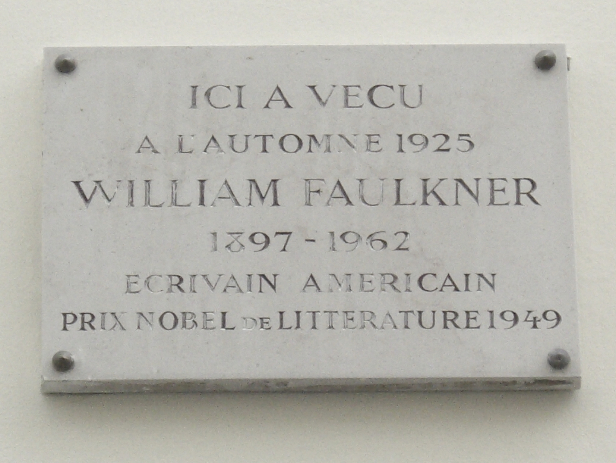 Plaque apposée au n° 26 de la rue Servandoni, Paris 6e, sur l'actuel Hôtel Luxembourg Parc, où séjourna l'écrivain William Faulkner (1897-1962) à l'automne 1925.